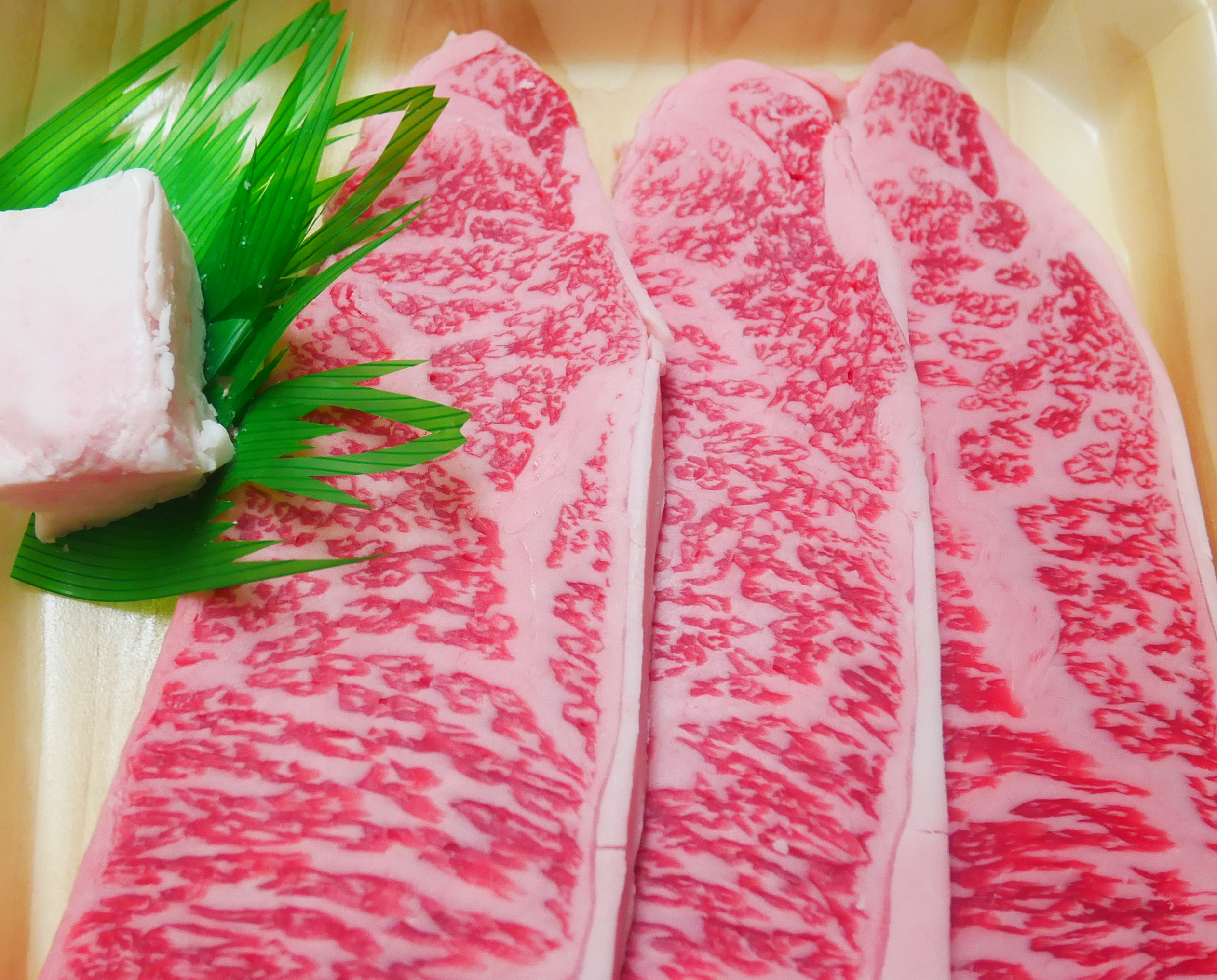 しまね和牛 (Shimane wagyu)